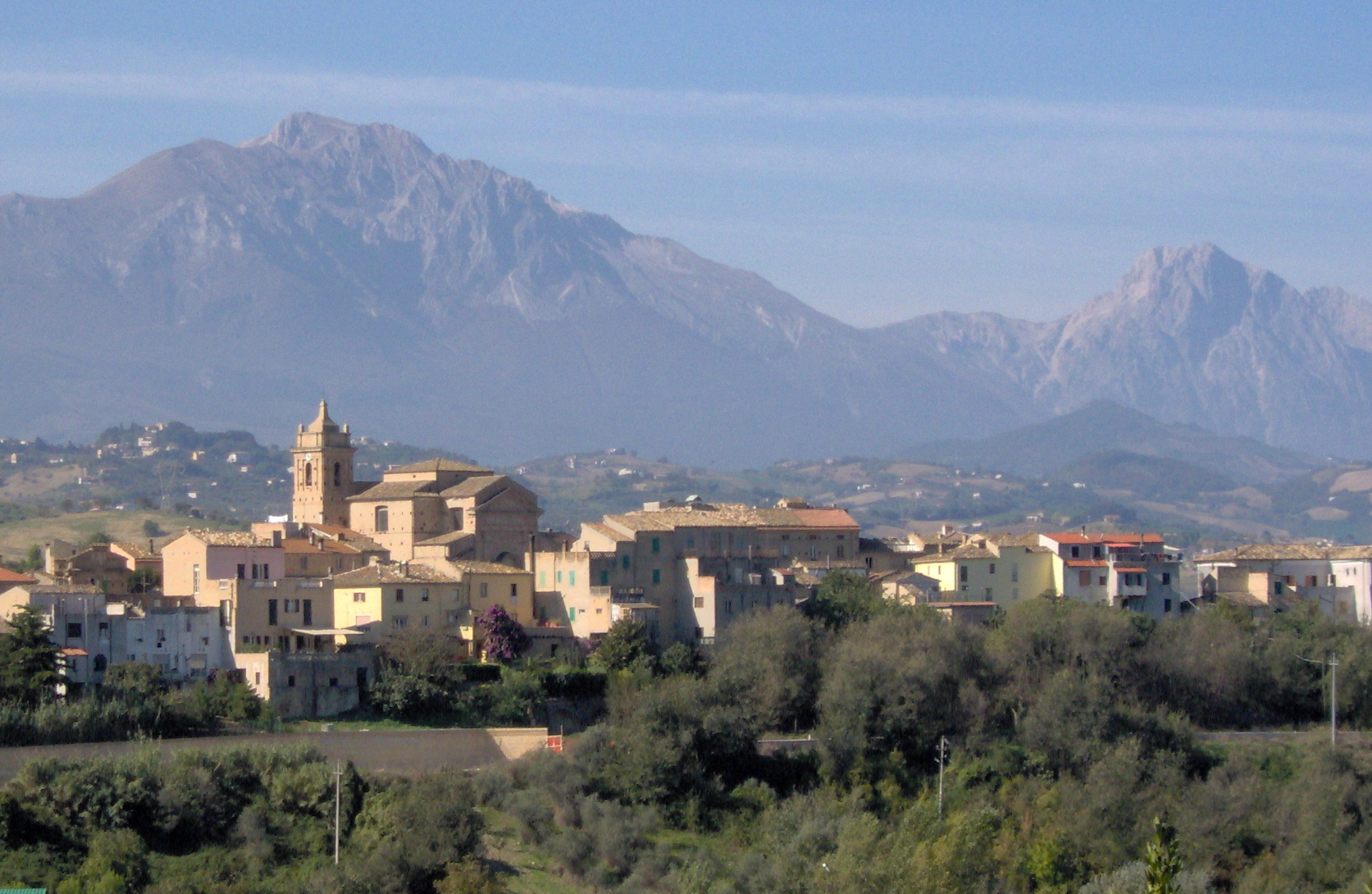 Picciano látképe